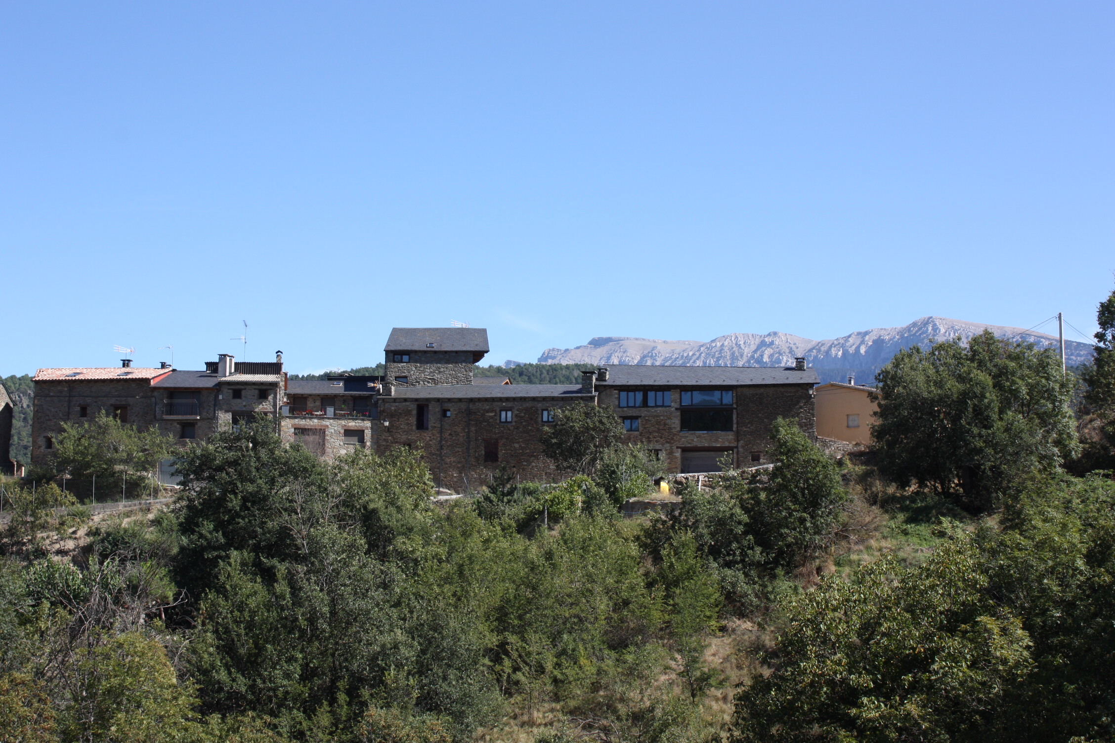 La Bastida d'Hortons